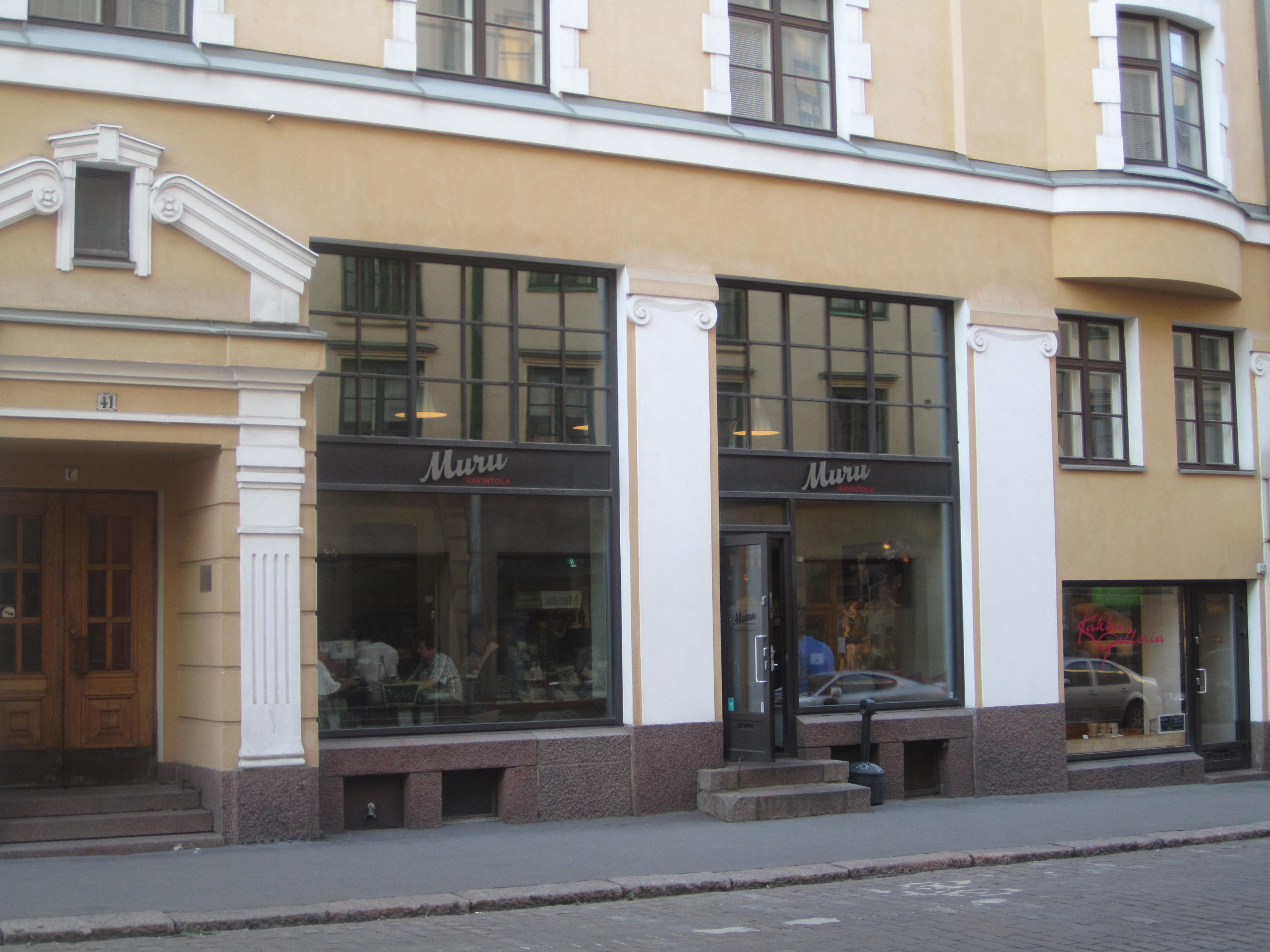 Ravintola Muru Helsingin Kampissa.